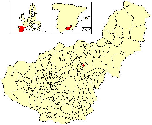 Situación del término municipal de Benalúa respecto a la provincia de Granada, en España.